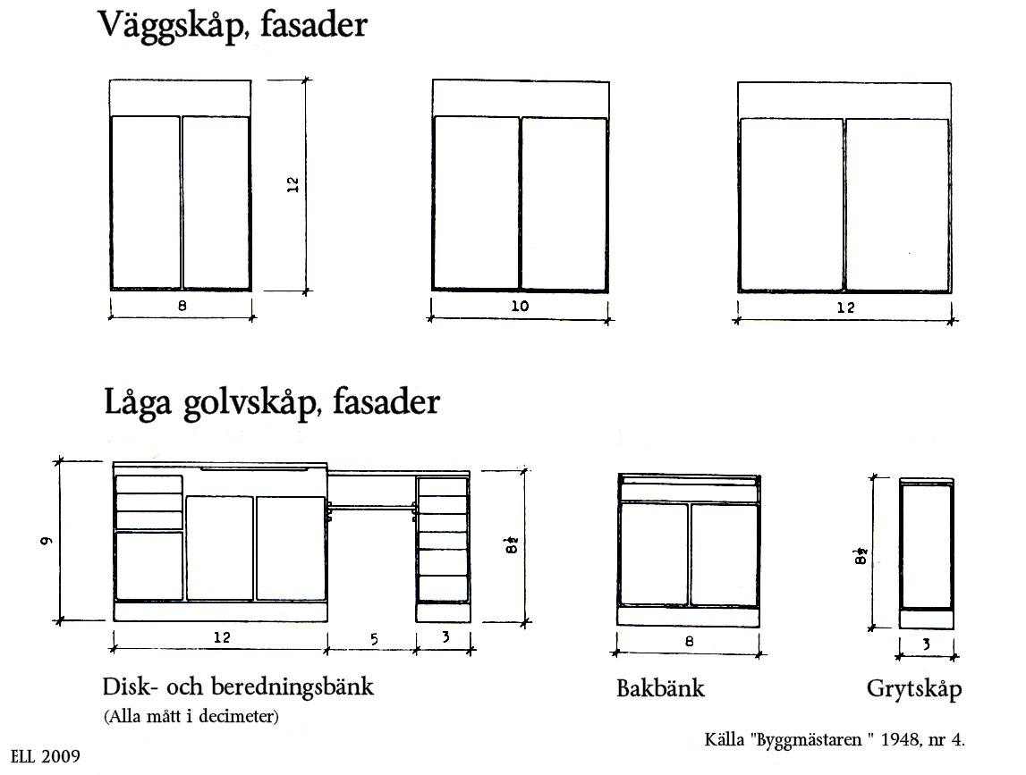 Förslag till standard för svensk köksinredning 1948. Källa: tidskriften "Byggmästaren" nr 4 från år 1948.